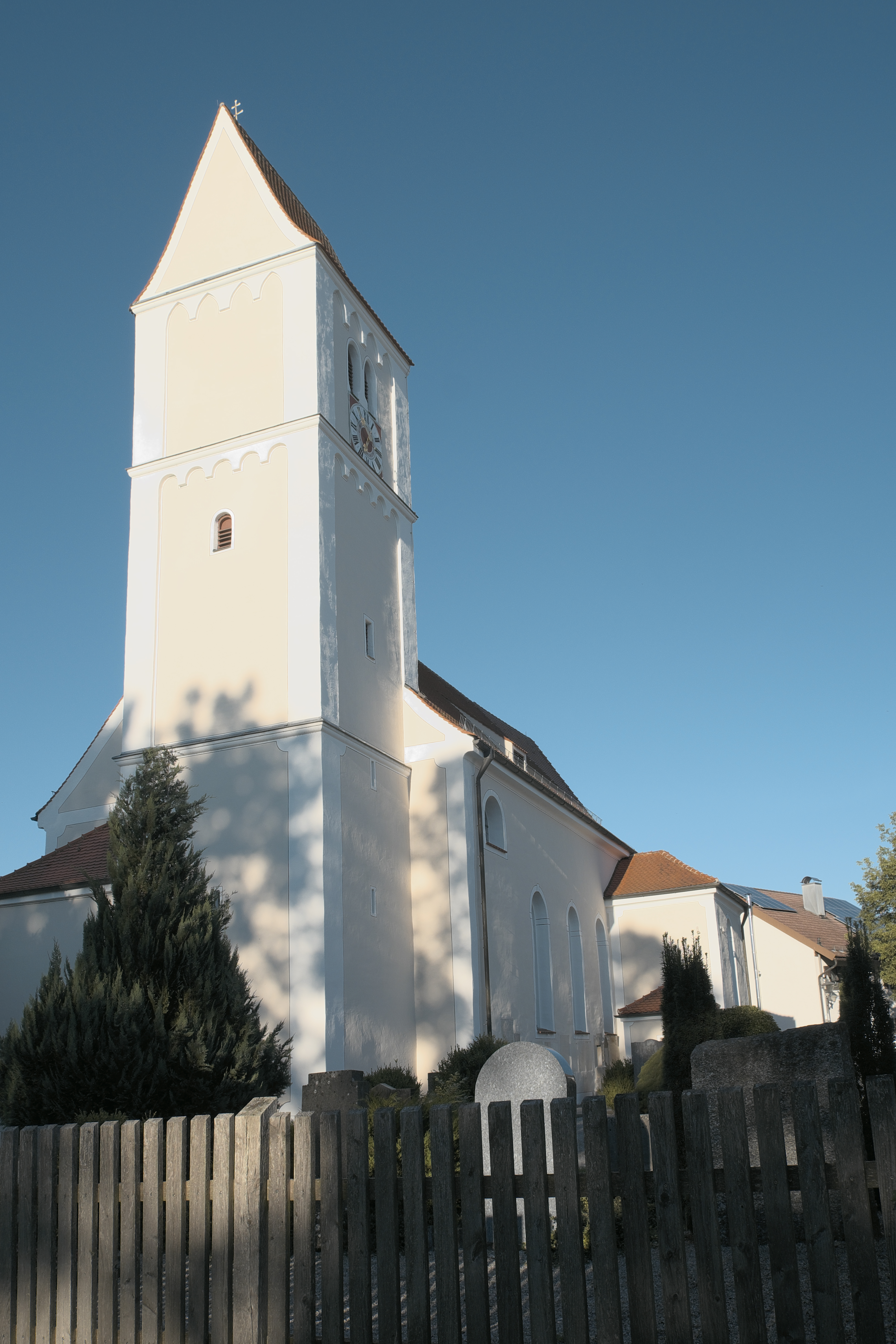 Katholische Pfarrkirche Heilig Geist in Unterapfeldorf, einem Ortsteil von Apfeldorf im Landkreis Landsberg am Lech (Bayern/Deutschland)